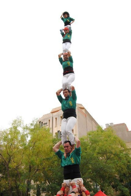 Primer pilar de 6 carregat pels Castellers de Sabadell en la Diada dels Saballuts (Plaça de Sant Roc, Sabadell, 23 d'octubre del 2011). Aquest va ser el primer pilar de 6 carregat a plaça. No obstant això, el primer en ser carregat i descarregat es va aconseguir l'11 d'octubre del 2011 a la xarxa de seguretat durant un assaig al local dels Castellers de Sabadell.